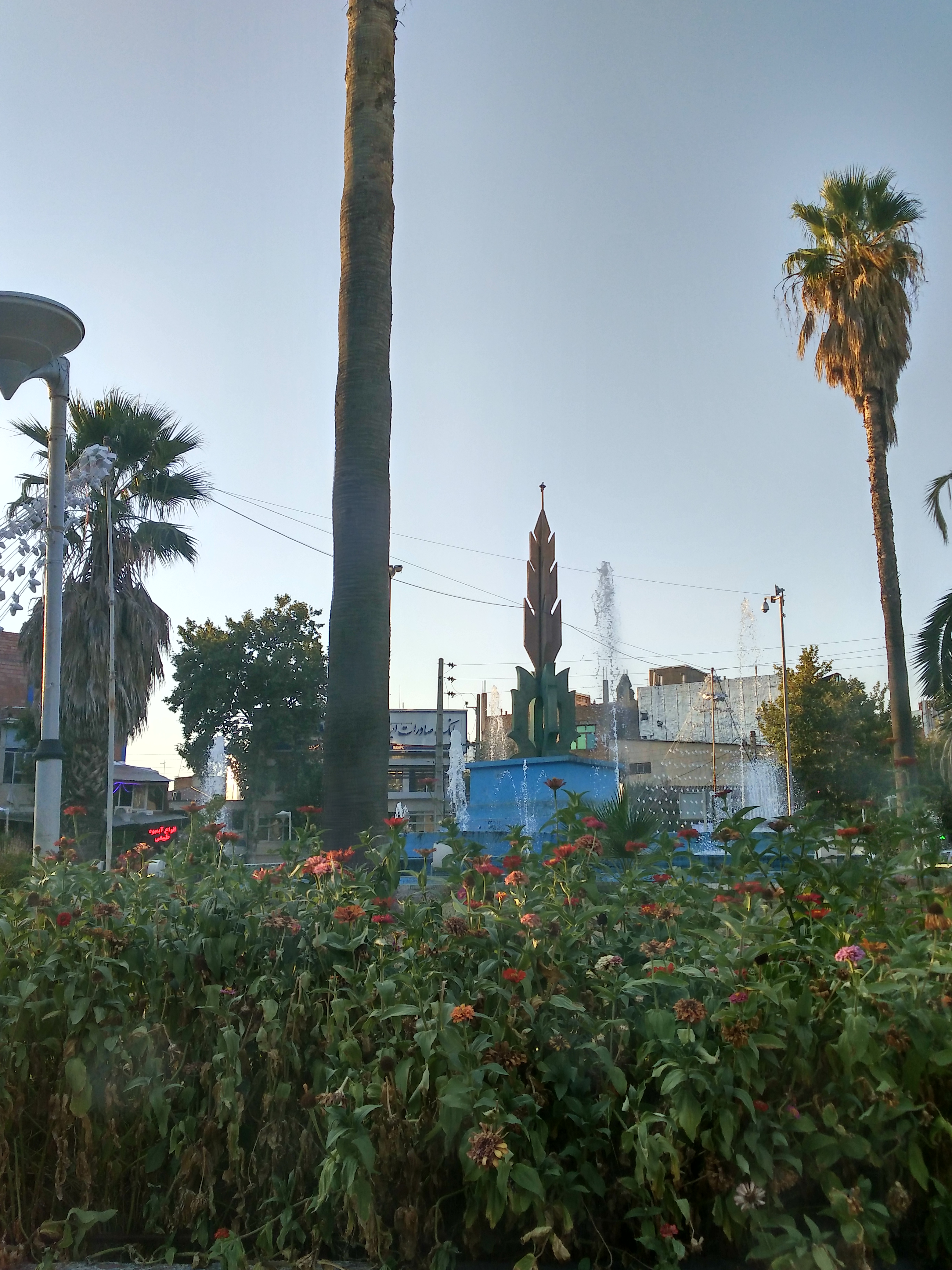 فلکه مرکزی شهر مینودشت